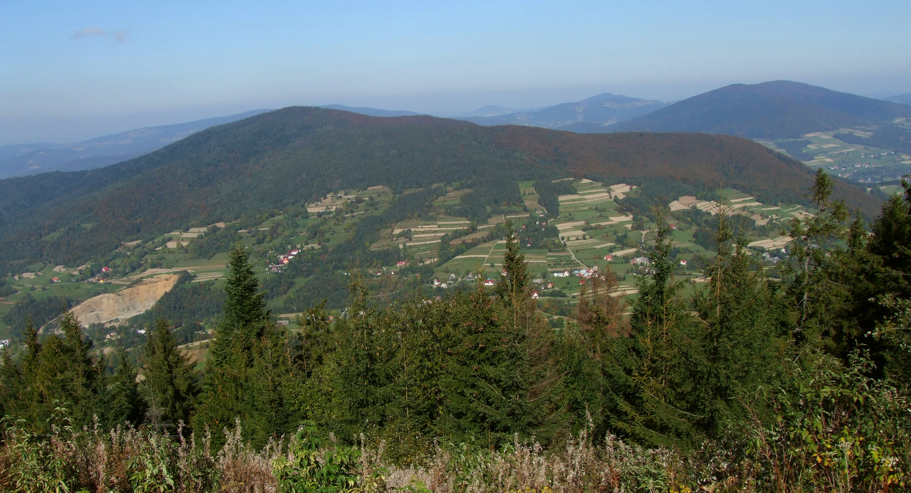 Szczebel (Beskid Wyspowy)